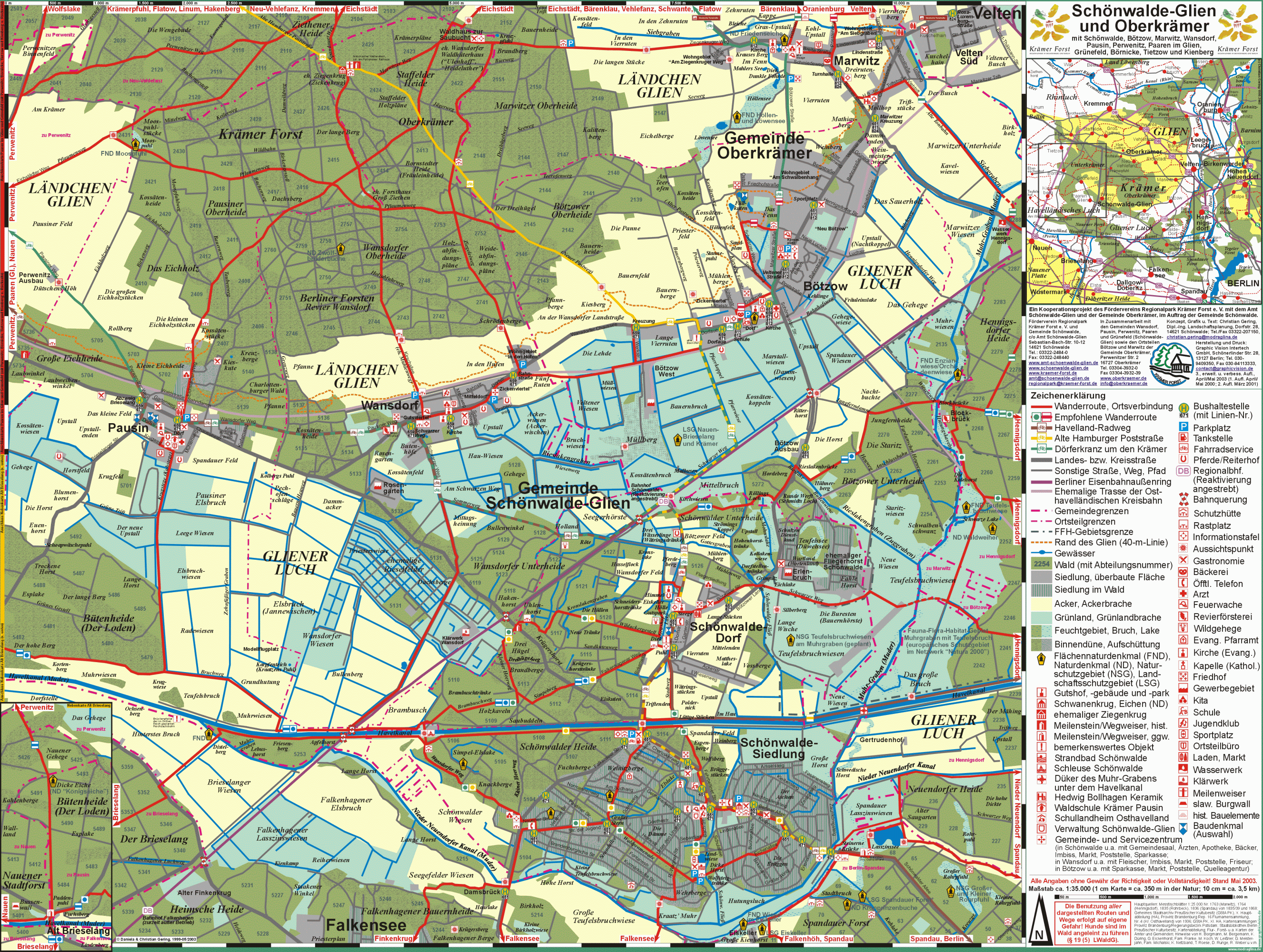 Karte der östlichen Ortsteile der Gemeinde Schönwalde-Glien (Pausin, Wansdorf, Schönwalde-Siedlung und Schönwalde-Dorf) sowie der Ortsteile Bötzow und Marwitz der Gemeinde Oberkrämer. Autor: Christian Gering. Jahr: 2003.